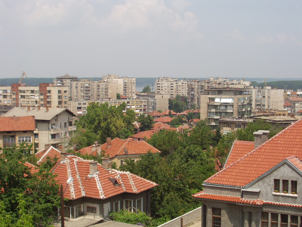 aus der engl. wiki, Autor: eu.stefan (Stefan Karakashev - )